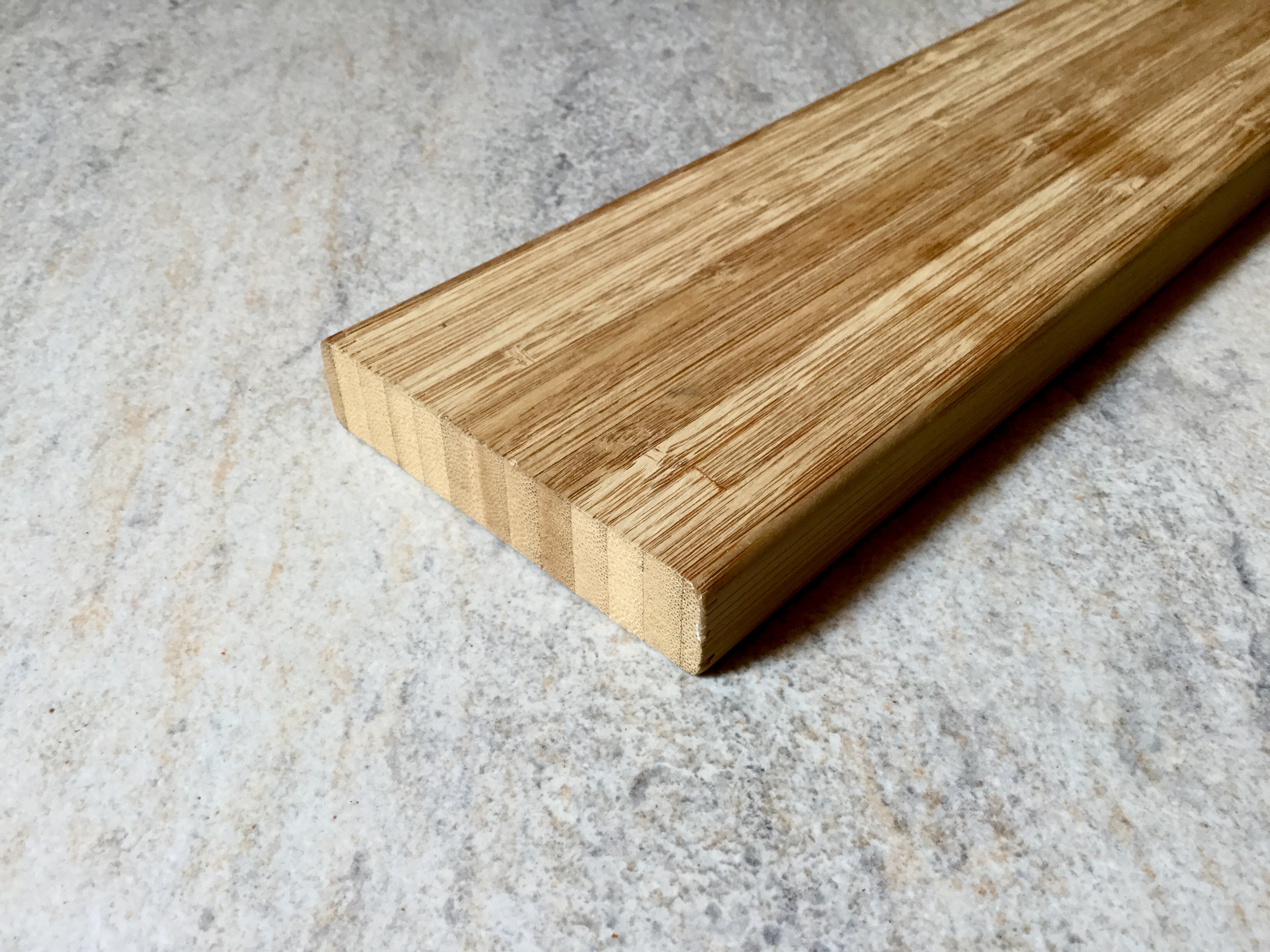 Dettaglio di un elemento di bambù lamellare